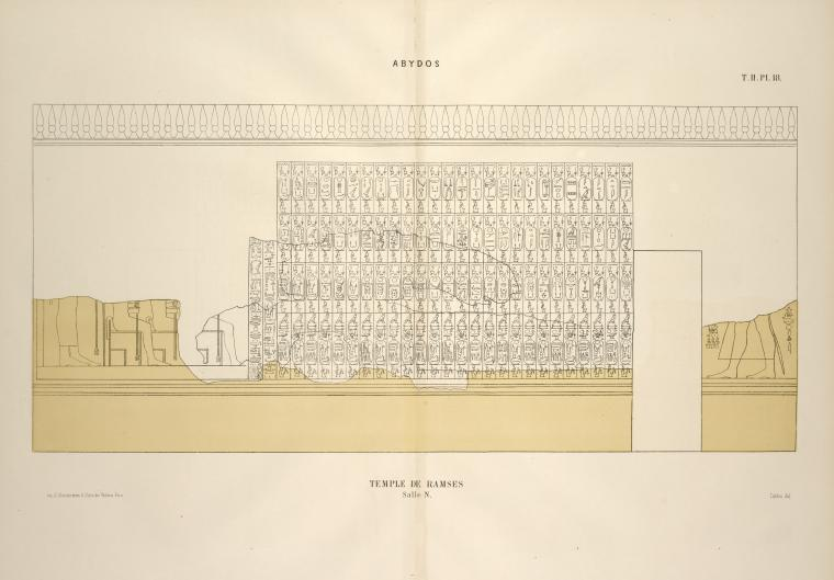 Реконструкция Таблицы Абидоса из храма Рамзеса II